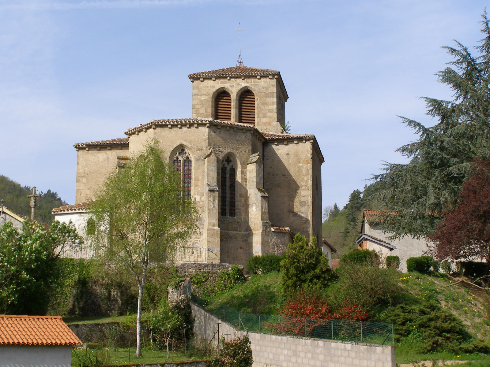 Église Saint-Laurent de Saint-Laurent-Rochefort, (Inscrit, 1972) .